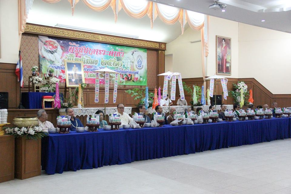 พิธีรดน้ำดำหัวคณาจารย์ 2560